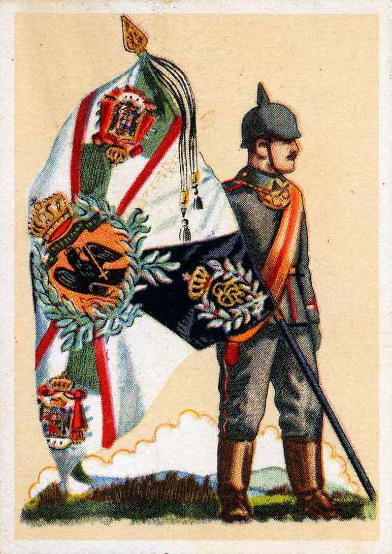 Fahne des Landwehr-Regiments No. 93 (Anhalt)